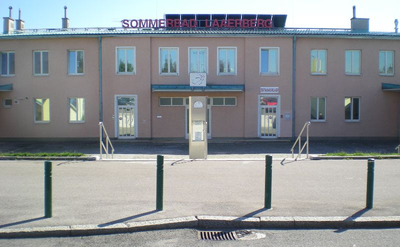 Das Laaerbergbad ist ein städtisches Sommerbad auf dem Laaerberg im 10. Wiener Gemeindebezirk Favoriten.